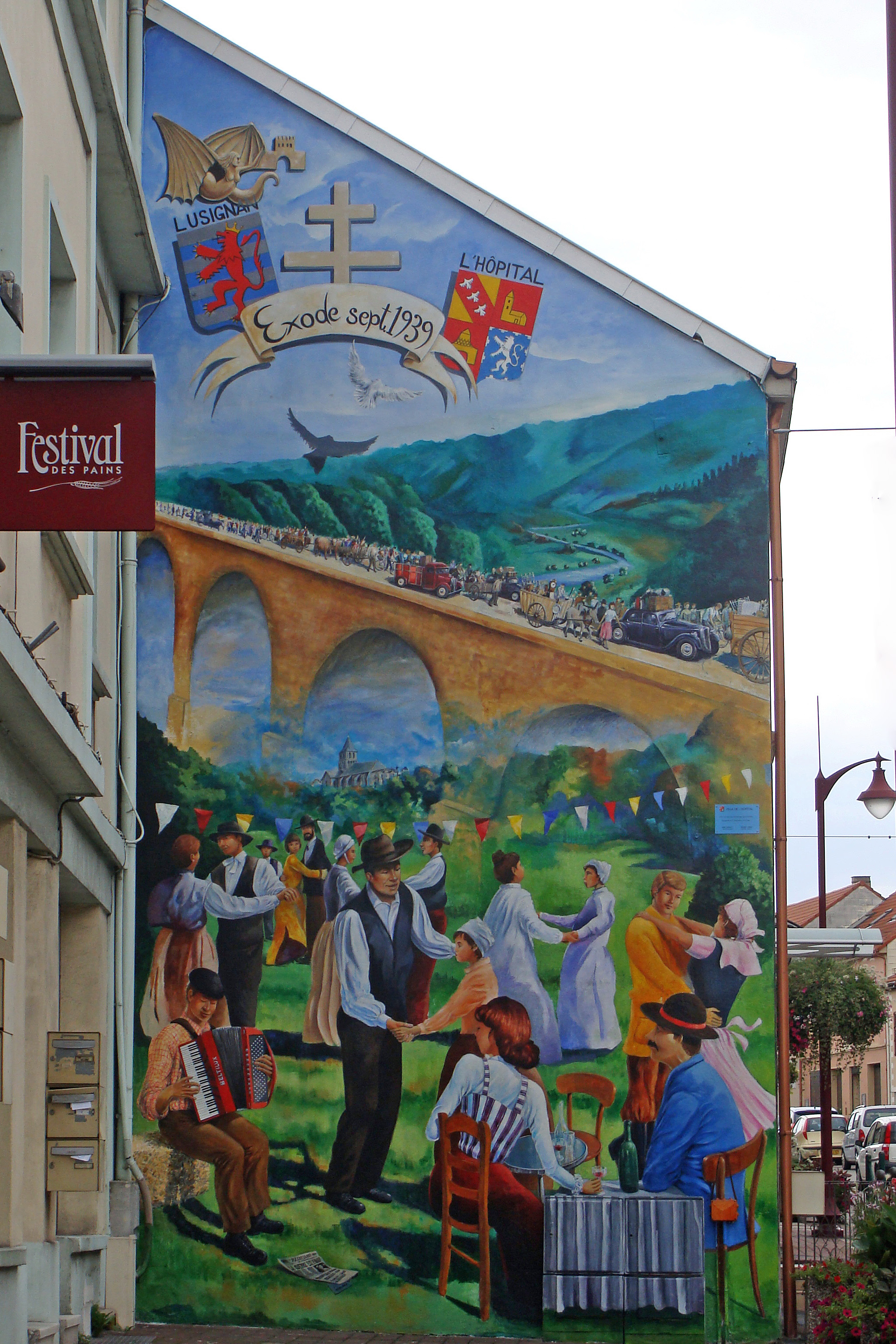 Fresque réalisée par l'artiste-peintre Éric Haven à L'Hôpital (Moselle) rue du Maréchal Foch (2013).